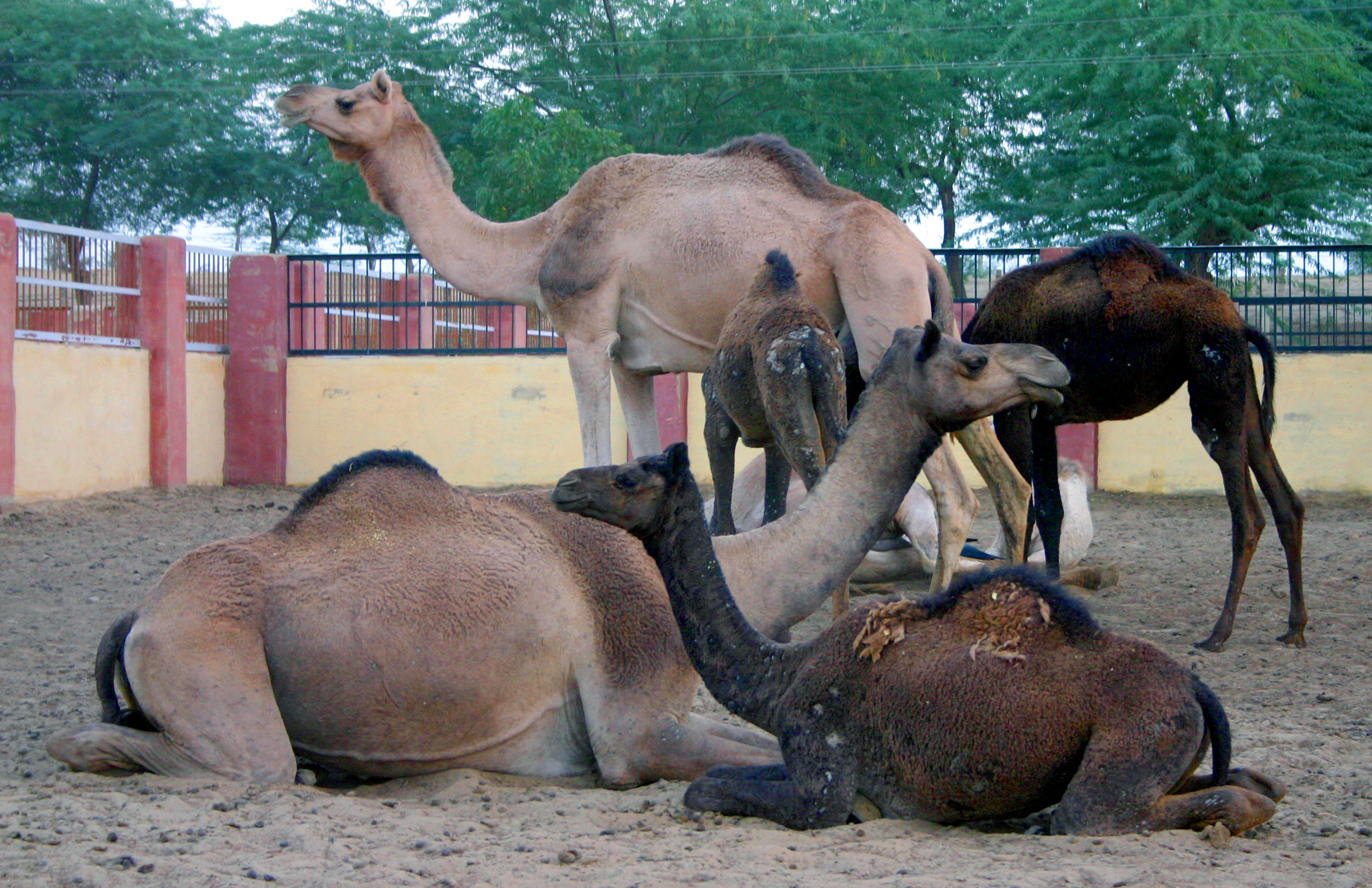 Kamelfarm bei Bikaner / Rajasthan